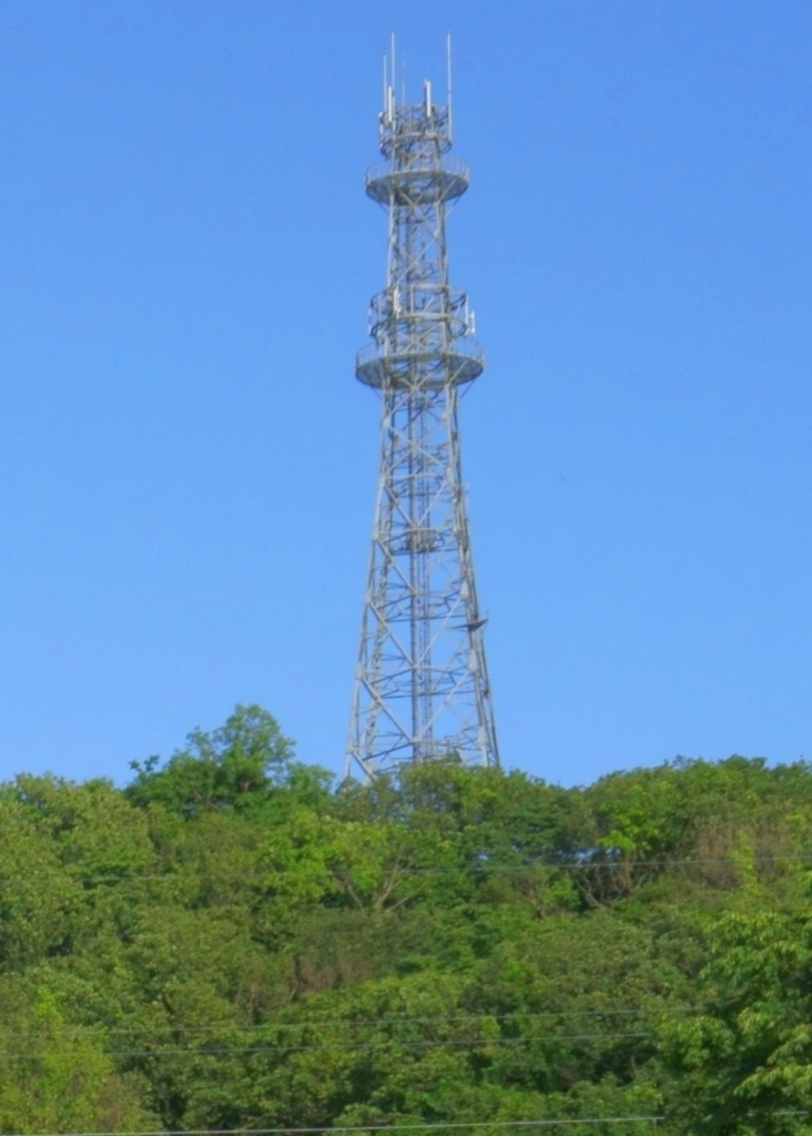 太平川に架かる橋梁を渡る特急「いなほ5号」。後ろの山が金照寺山である。